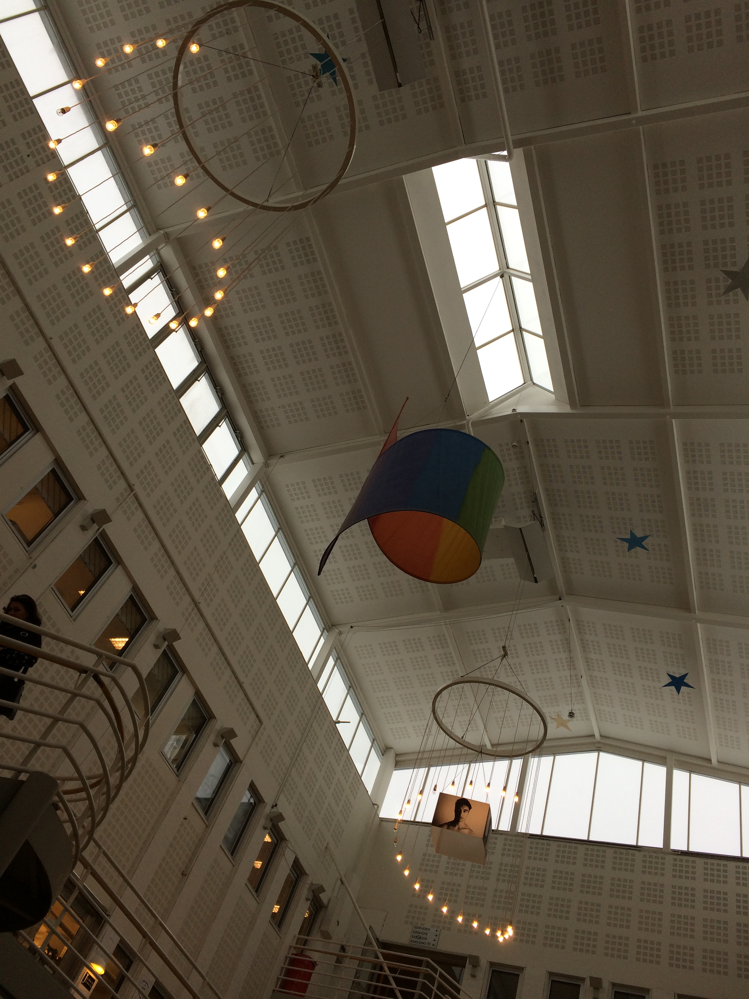 Utsmyckning i ljushallen på Nacka gymnasium